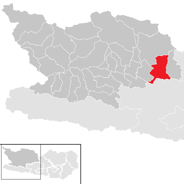 Bezirk Spittal an der Drau